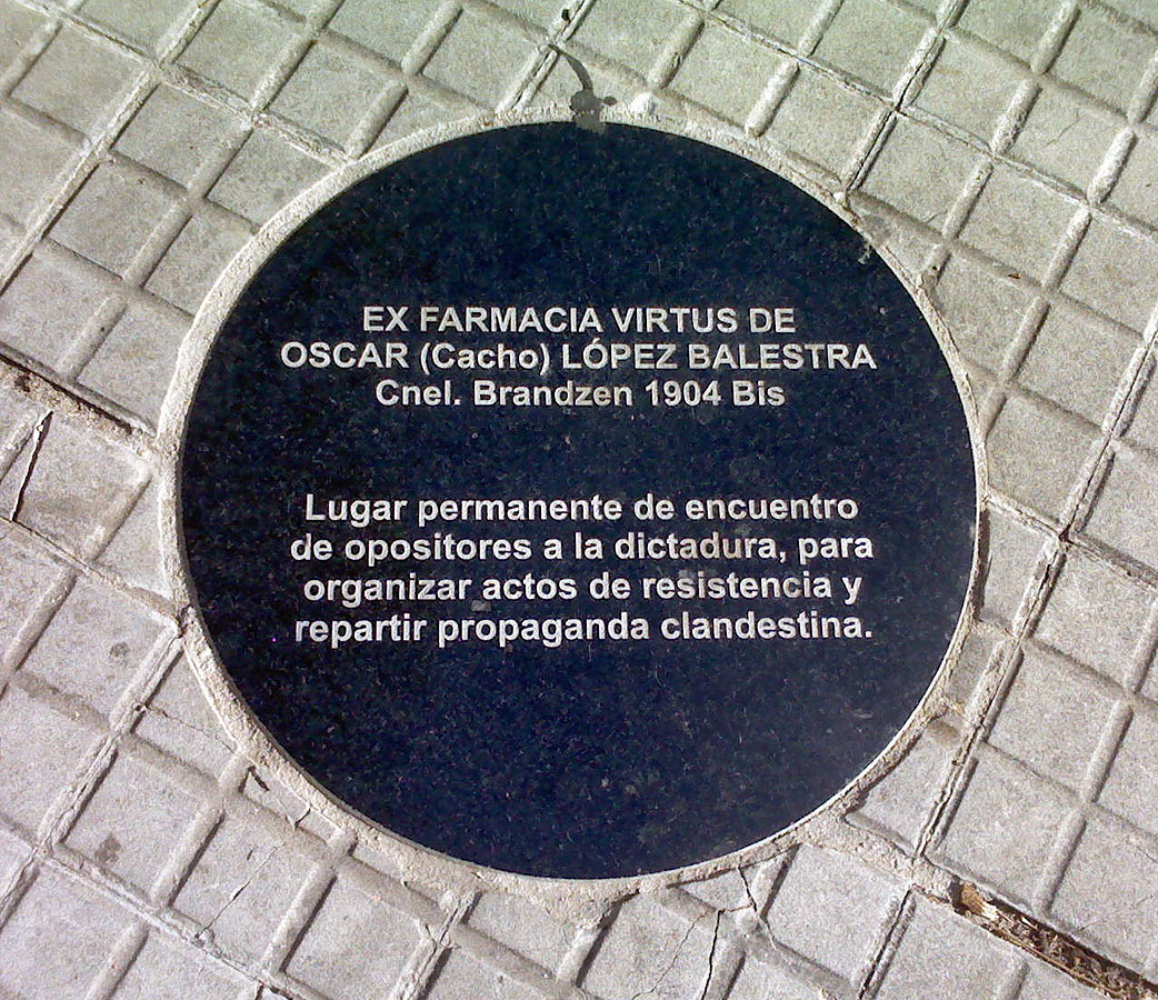 Marca de la memoria en la plazuela Silvestre Blanco, frente a la exfarmacia Virtus (Montevideo)